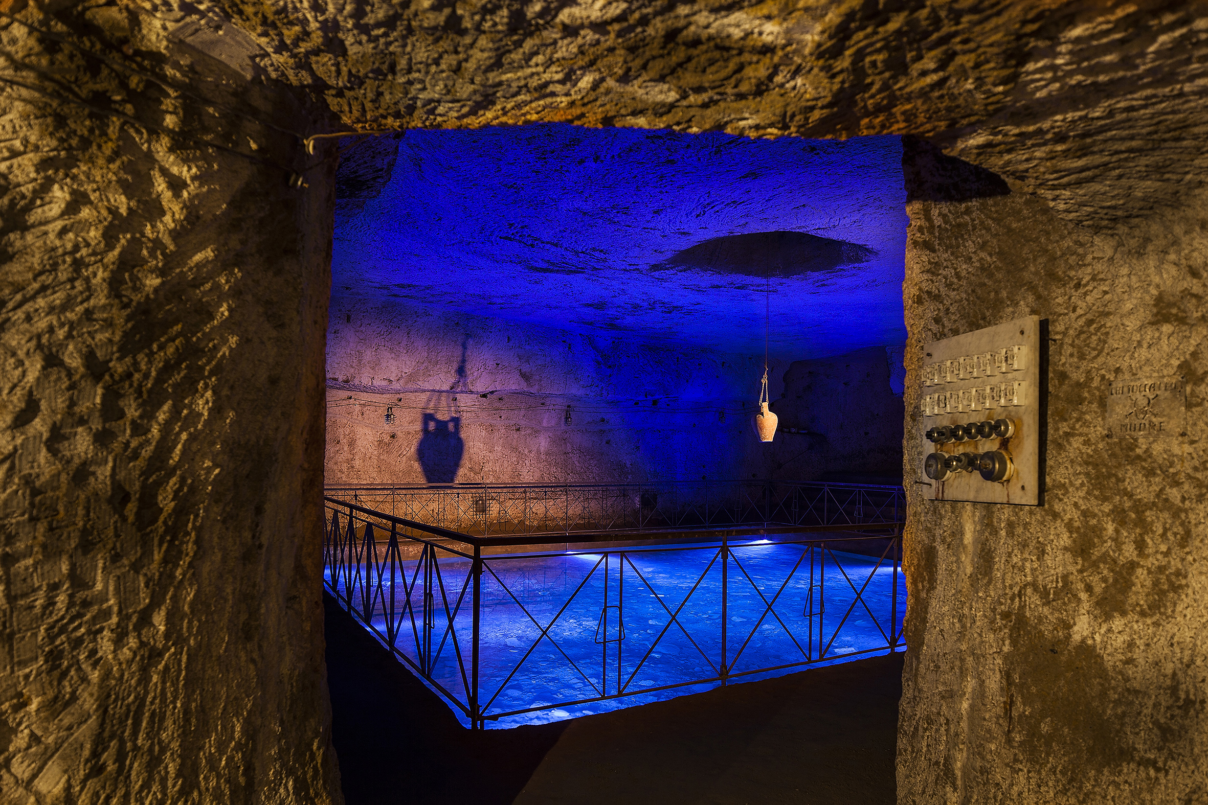 Galleria borbonica, Naples.